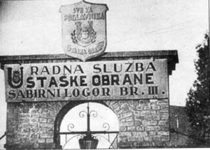 Brána v táboře Jasenovac.